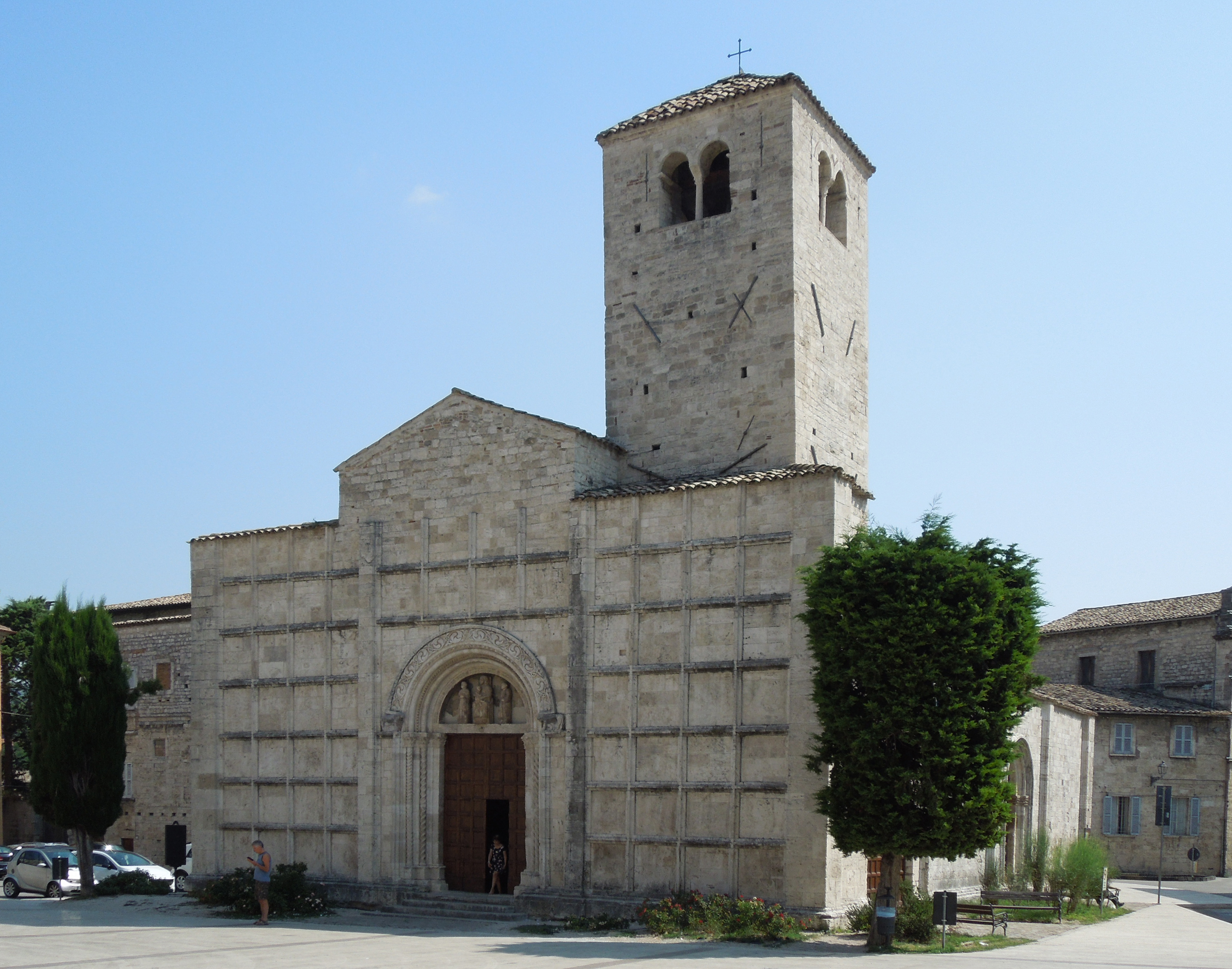 Facciata principale della chiesa dei Santi Vincenzo e Anastasio di Ascoli Piceno.